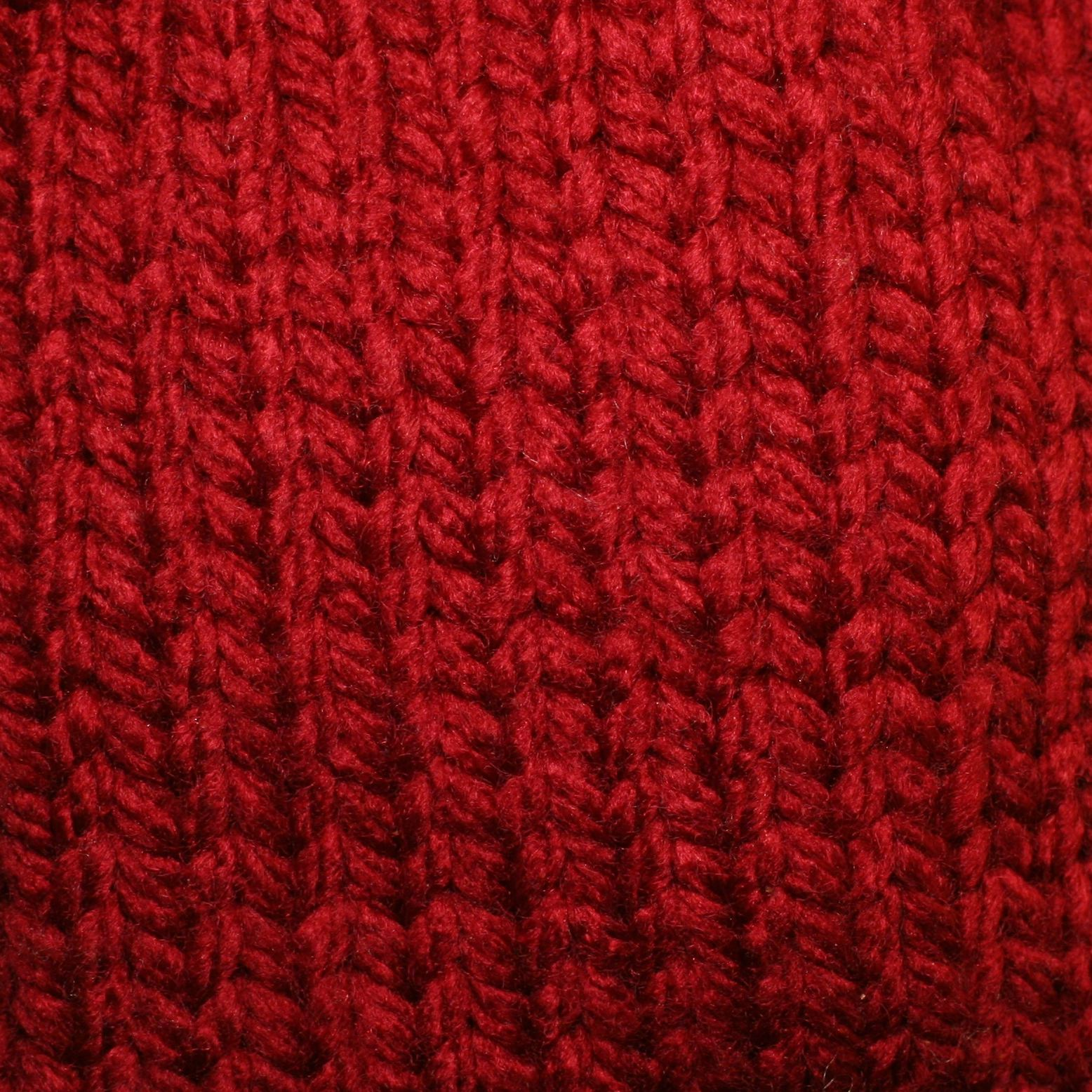 Stockinette stitch (knitting)